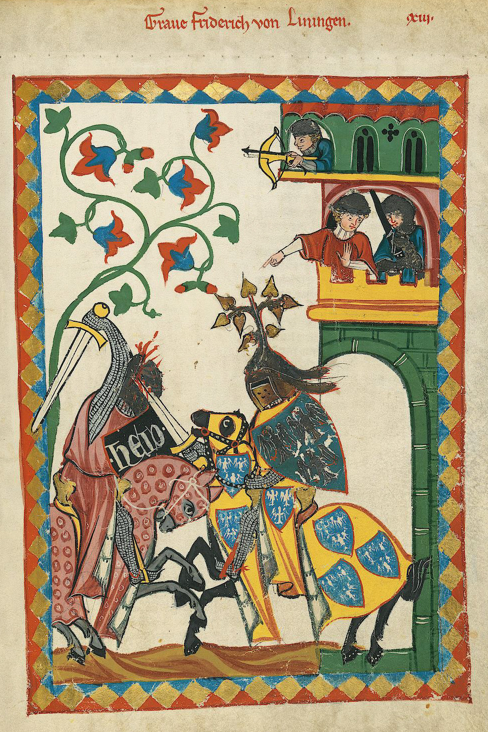 Codex Manesse, UB Heidelberg, Cod. Pal. germ. 848, fol. 26r: Graf Friedrich von Leiningen